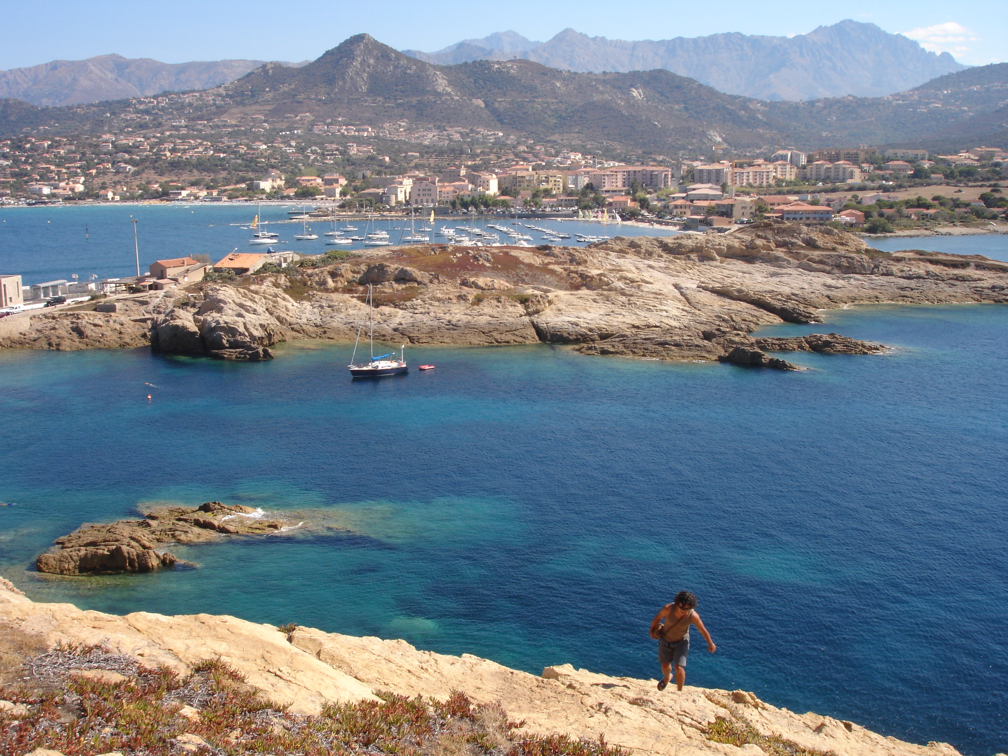 France, Haute-Corse (2B), île-Rousse, vue générale depuis la tour génoise